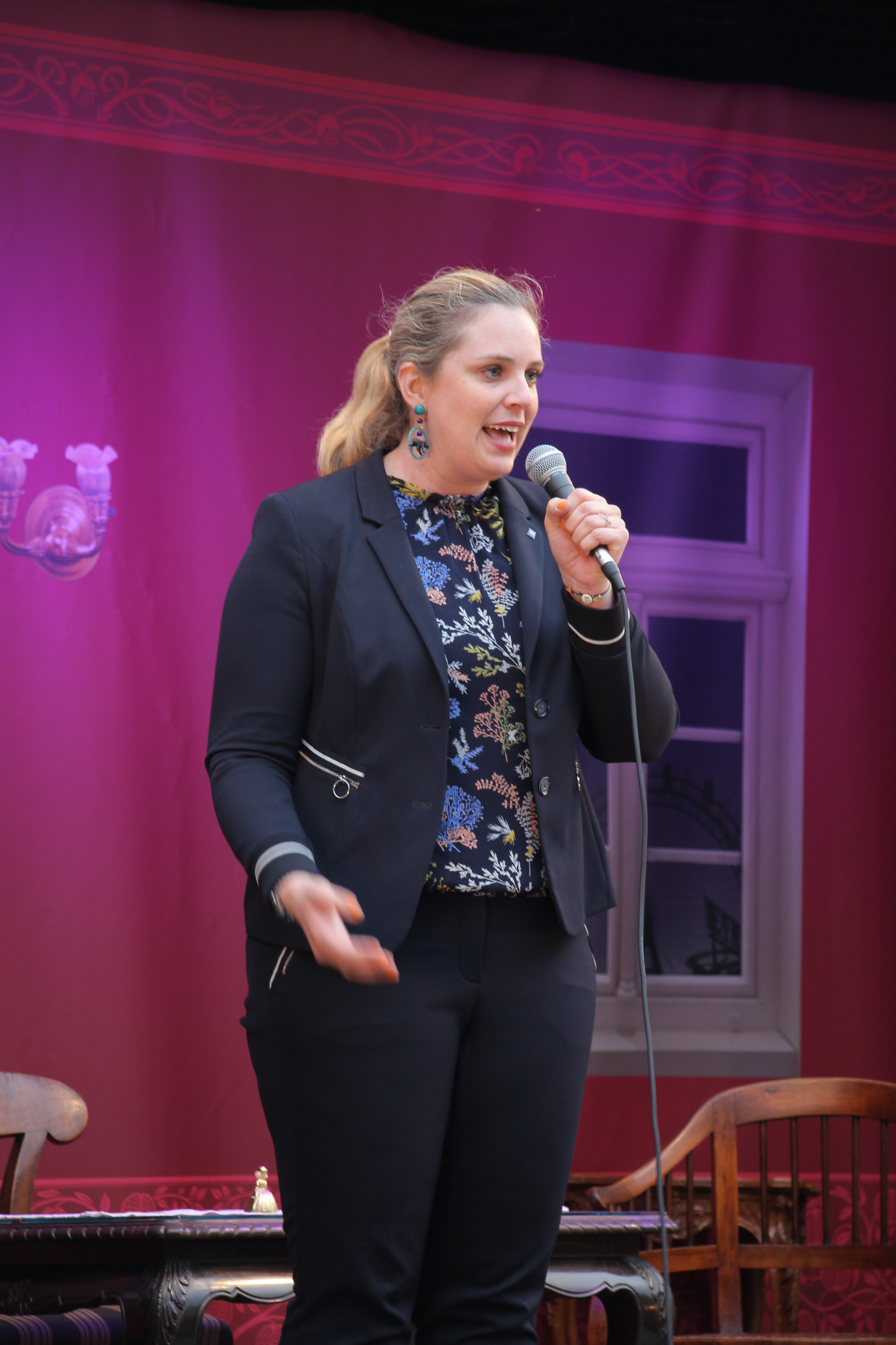 Das Lastkrafttheater bei einer Aufführung in Weissenbach bei Mödling, Hinterbrühl - Aufgeführt wurde der Einakter von Schnitzler Davor-Danach